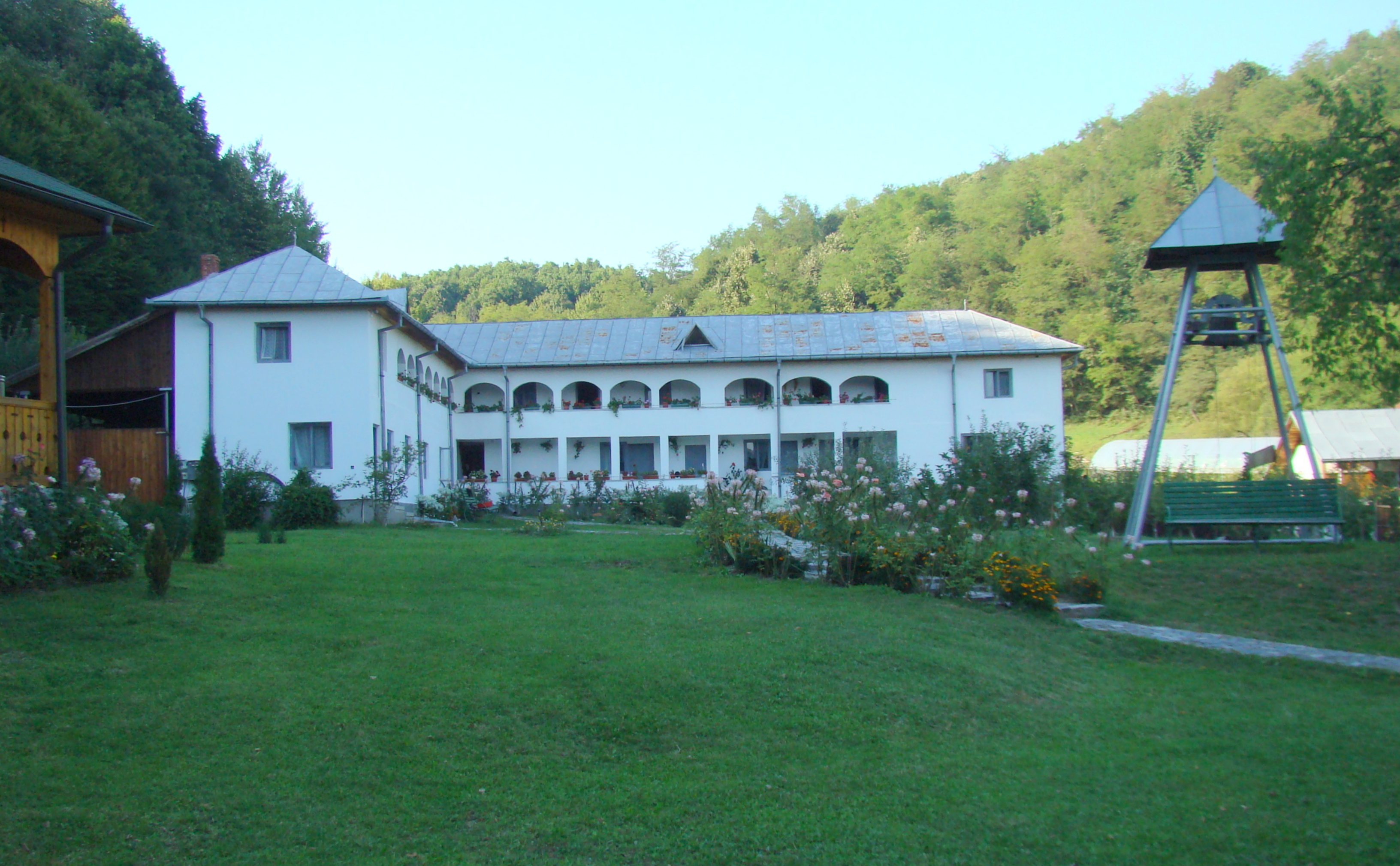 Chilii, sat Târgu Logrești; comuna Logrești 02